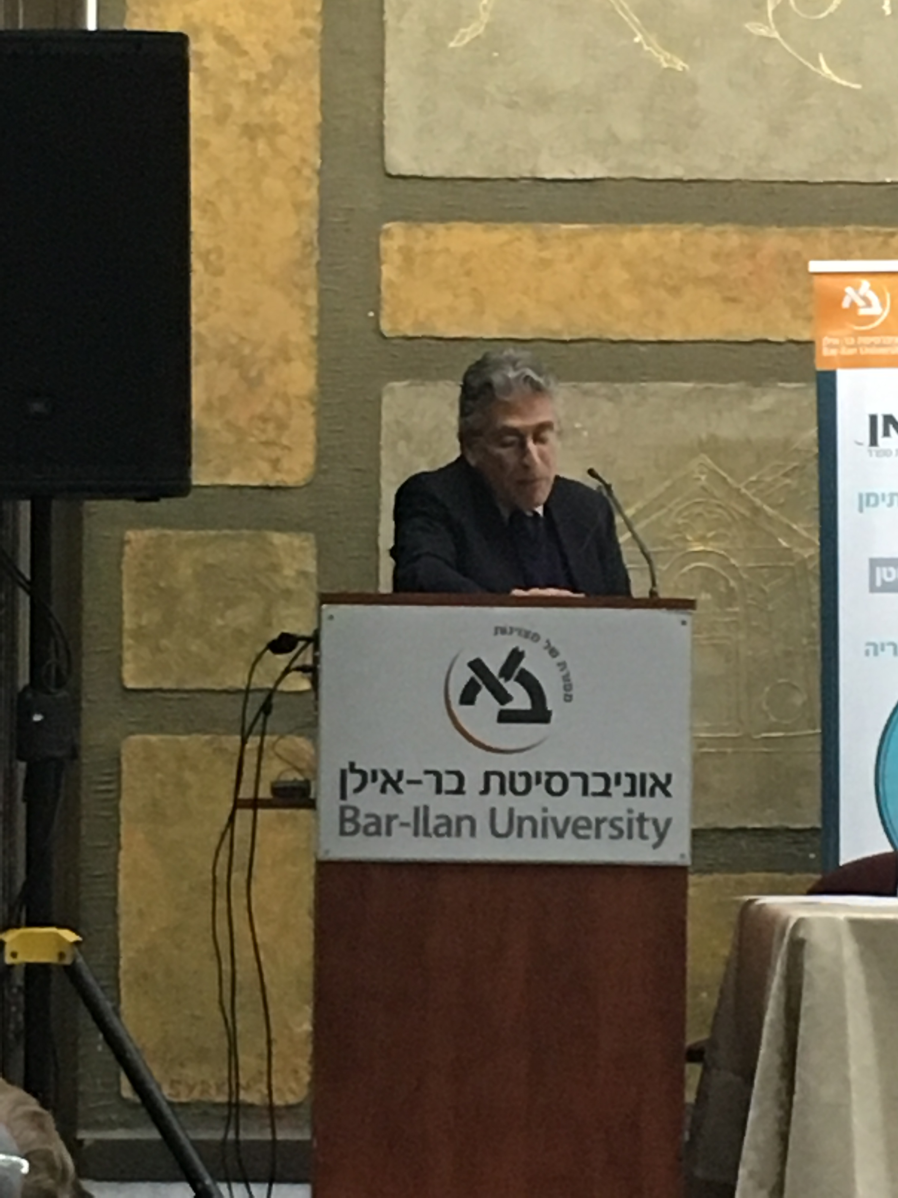 פרופסור נועם סטילמן בהרצאתו באוניברסיטת בר אילן במסגרת יום עיון בנושא הציונית ביהודי צפון אפריקה וארצות ערב